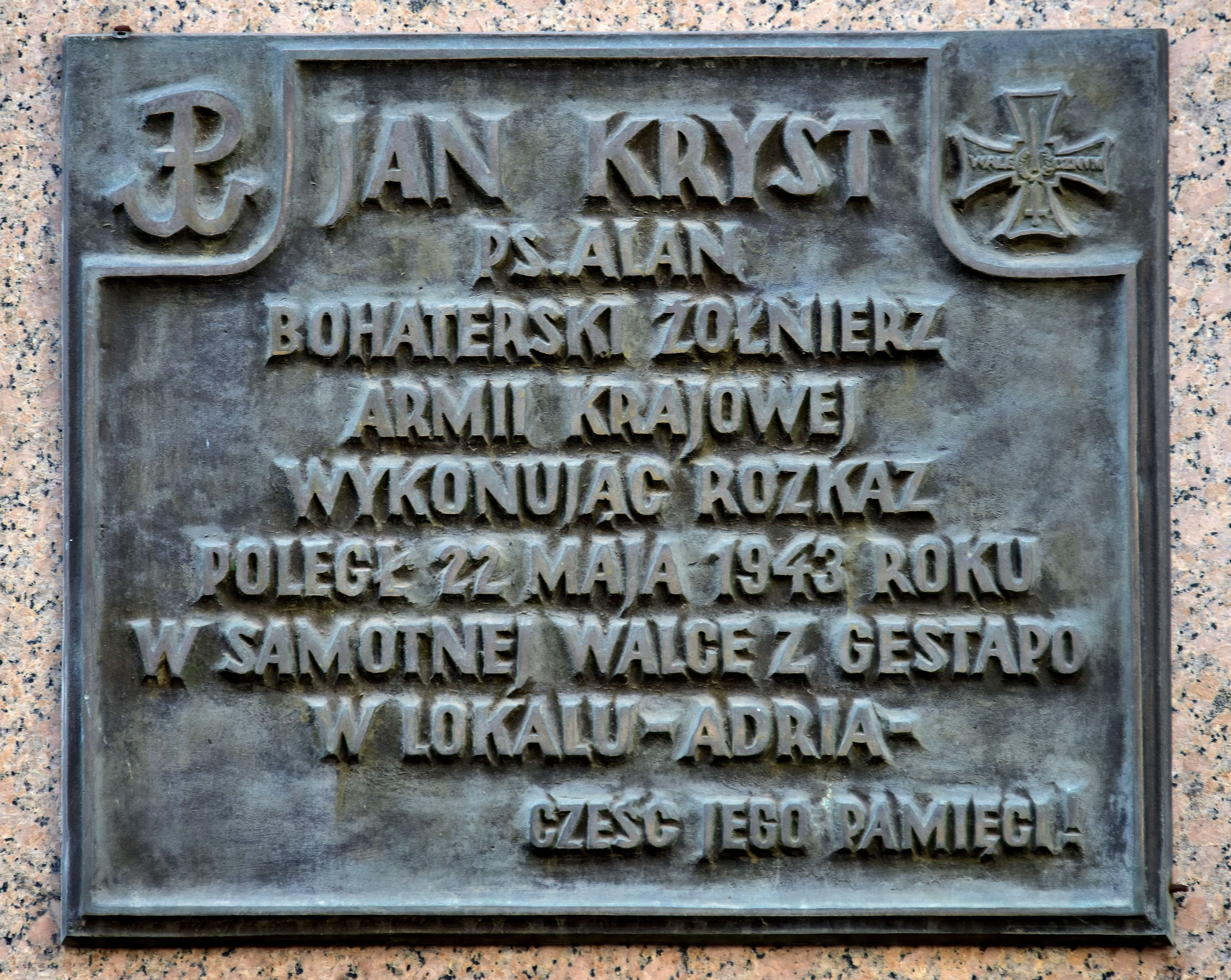 Tablica upamiętniająca Jana Krysta przy ul. Moniuszki 8 w Warszawie